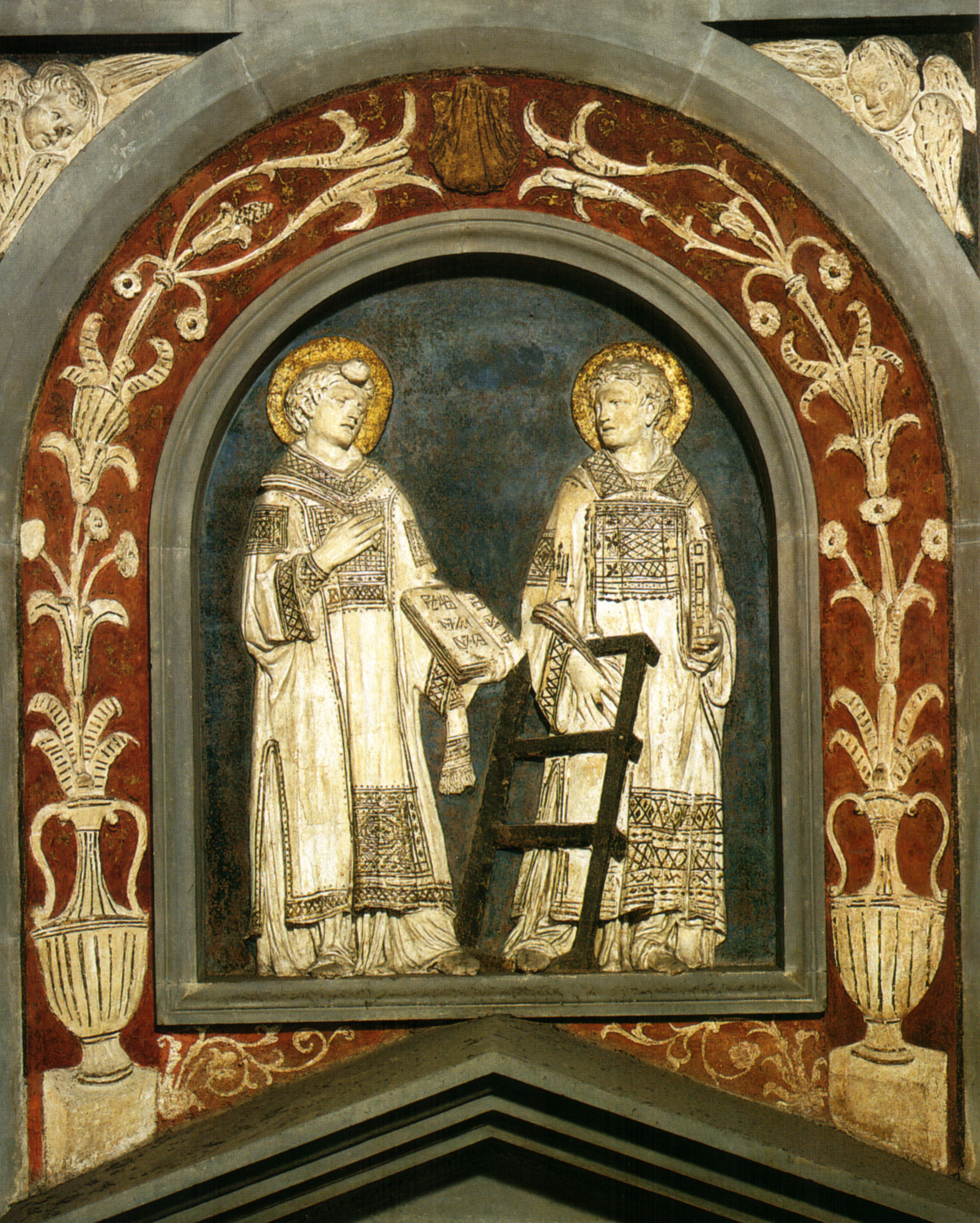 Donatello, santi stefano e lorenzo, 1434-43